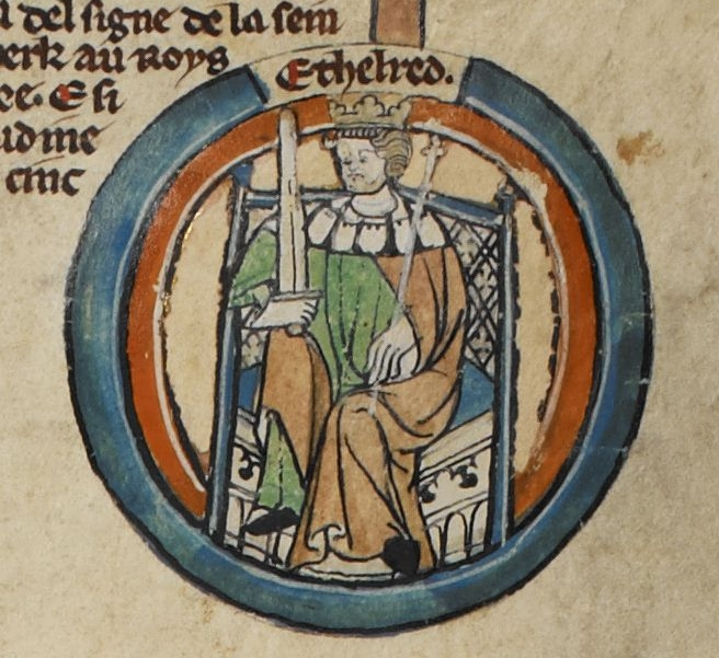 Miniature d'Æthelred de Wessex dans une généalogie royale du XIVe siècle.